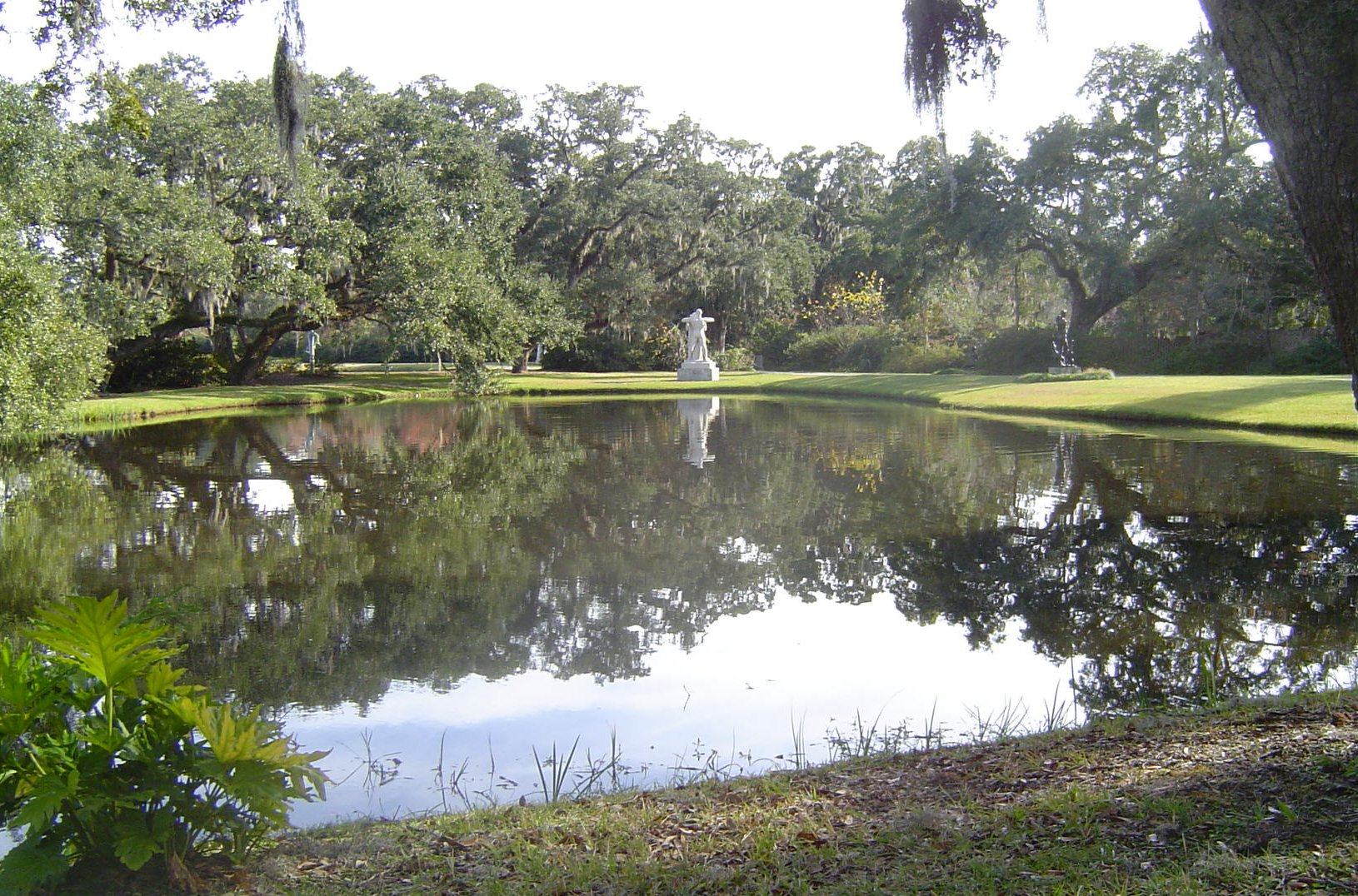 Brookgreen Gardens - sculpture garden